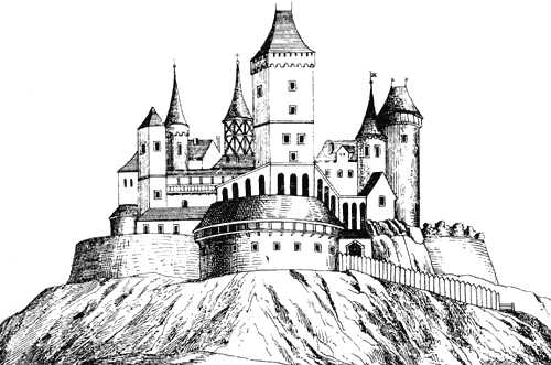 obrázek z údajná podoba hradu Veliš v roce 1650 na rytině J. Harnische podle staré malby z Kopidlna